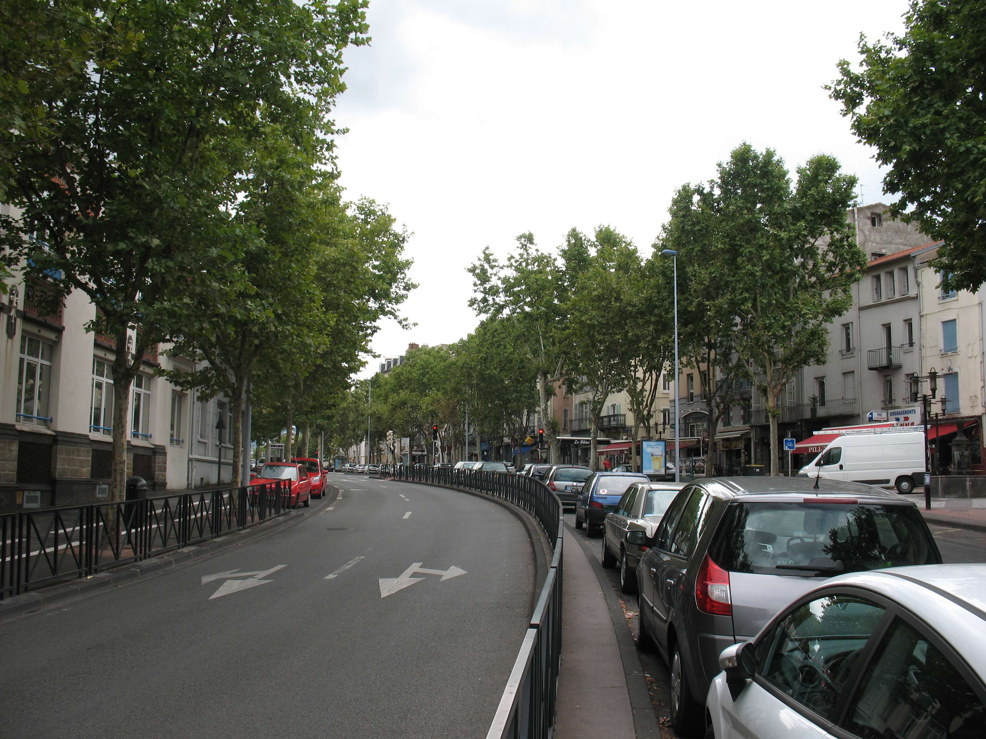 Clermont-Ferrand, France. Vue du boulevard Trudaine vers le sud. À gauche, l'école Jules-Ferry ; à droite, la fontaine de la Flèche.